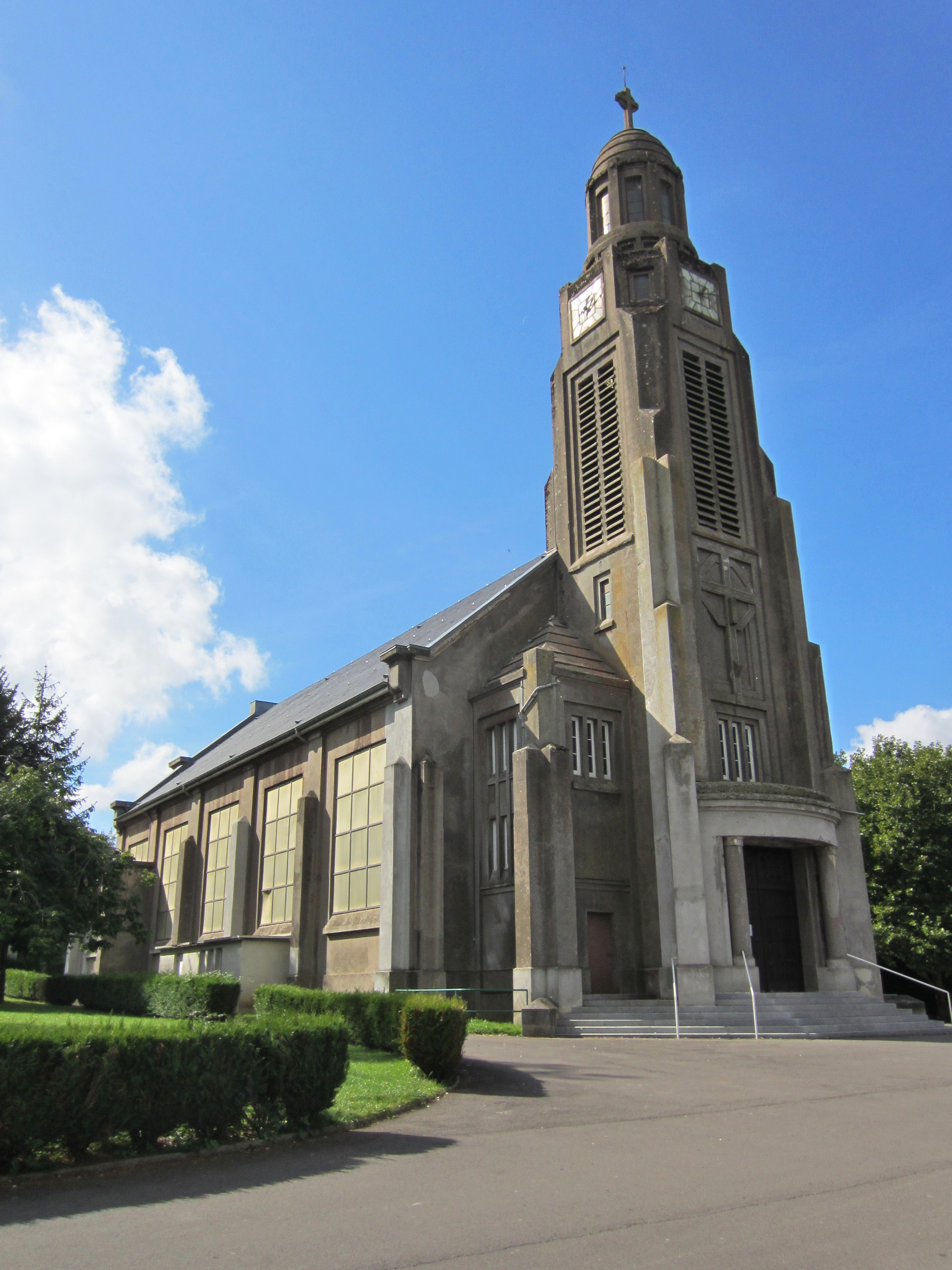 Description nouvelle eglise Hussigny nouvelle eglise Hussigny